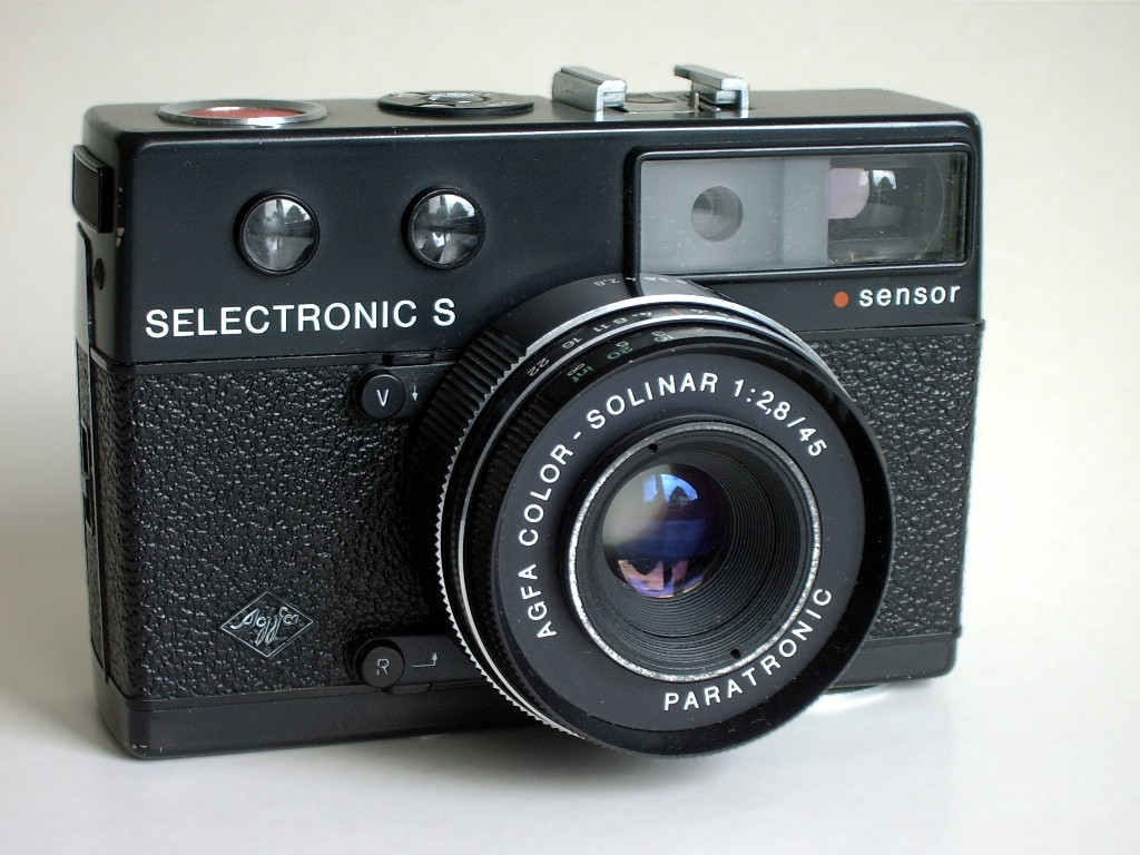 Agfa Selectronic S - compact camera for 135 film